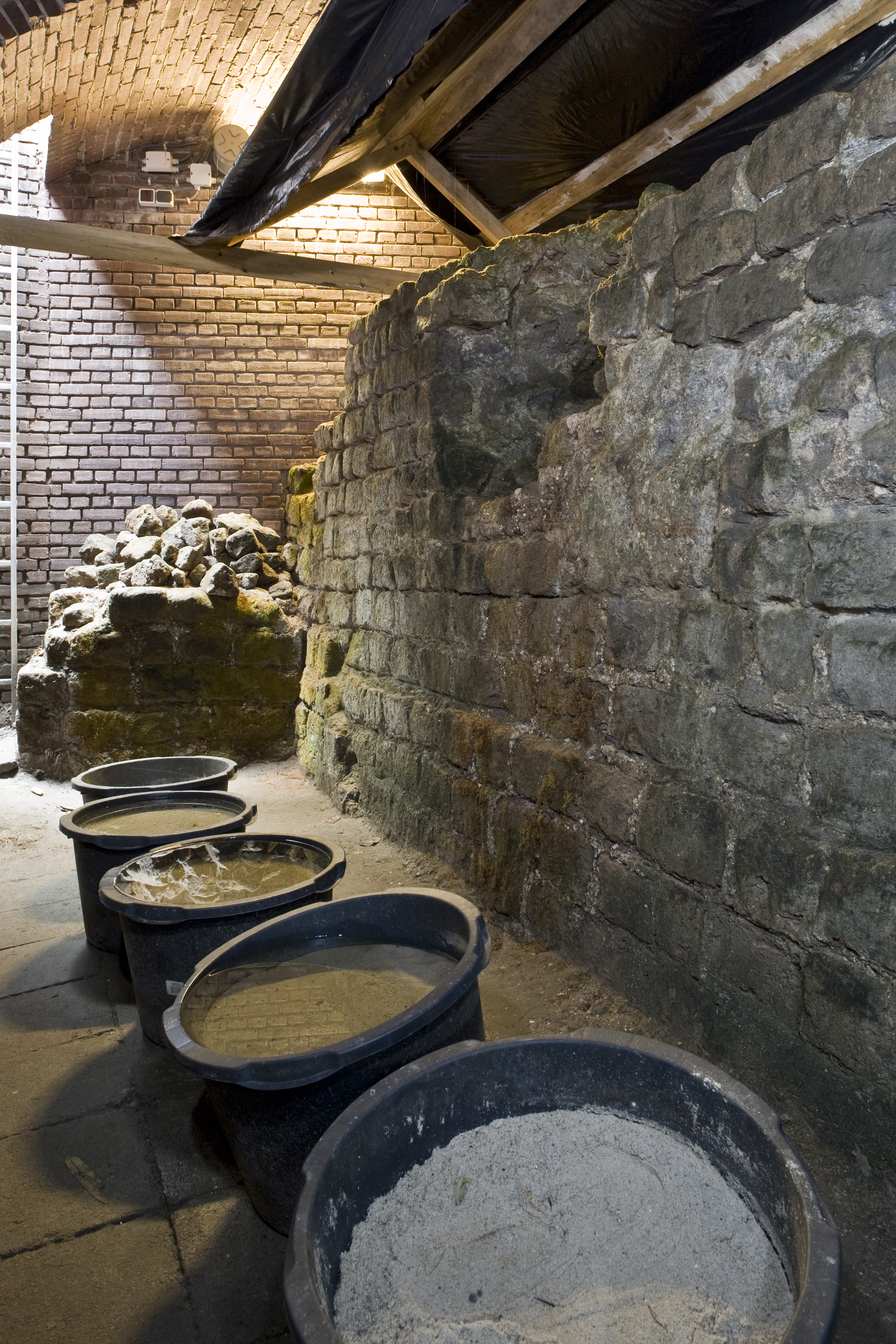 Overgebleven van de muur van het castellum Traiectum onder het Utrechts Centrum voor de Kunsten aan het Domplein